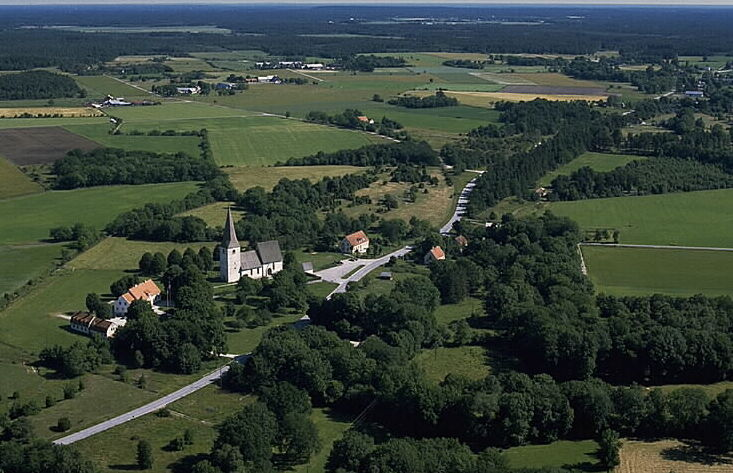 Alskogs kyrka i bildens mitt. Motiv: Alskog Nyckelord: Flygbilder, Riksintressen Kategori: Miljöer, OdlingslandskapAlskogs kyrka i bildens mitt.